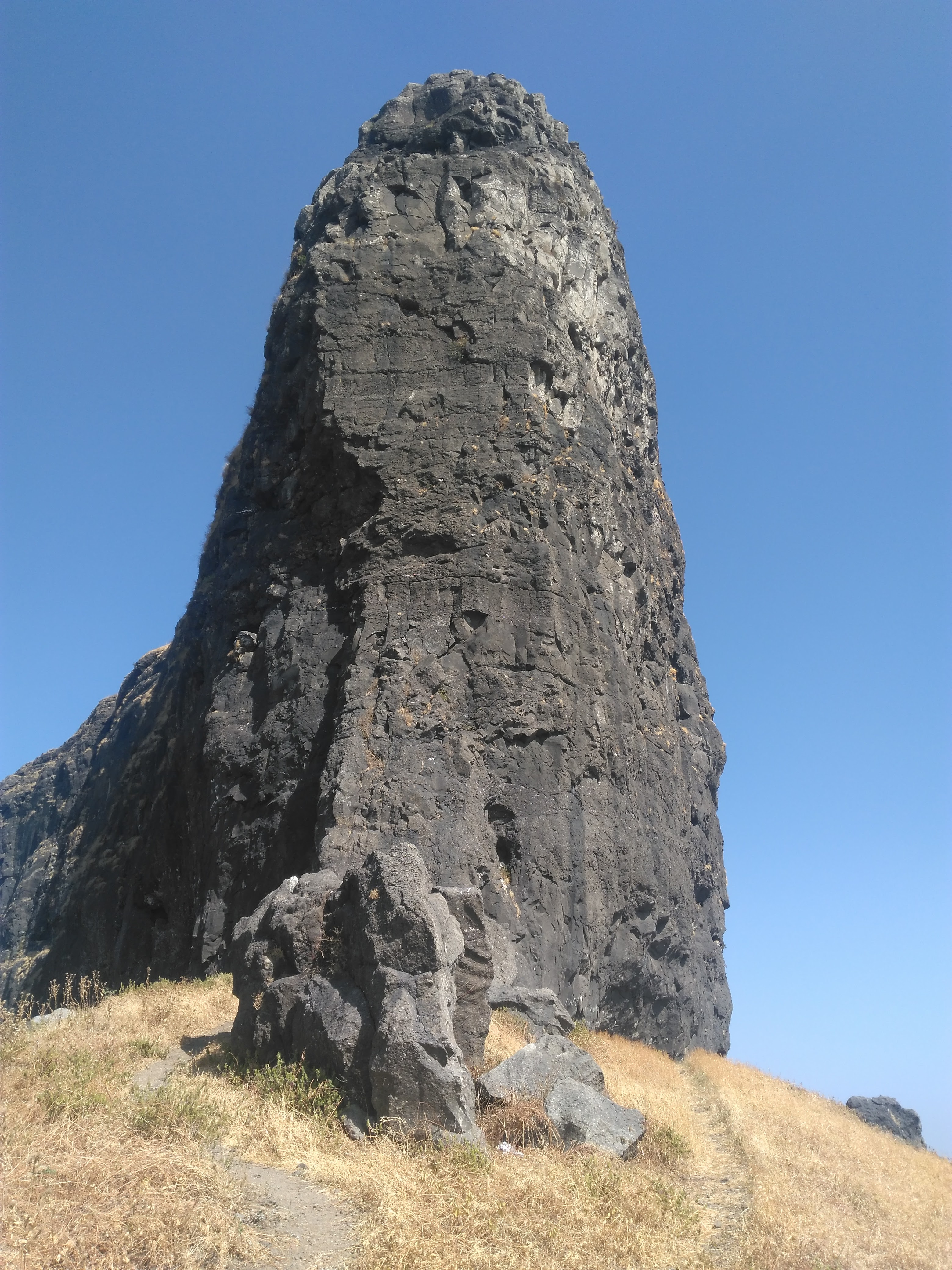 धोडप सुळका